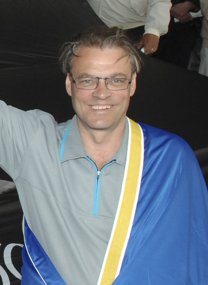 Petri Puro framför Commander Crowes tifo efter rekordloppet då hann vann 20e raka segern från debuten. Foto: Thomas Blomqvist, Kanal 75.